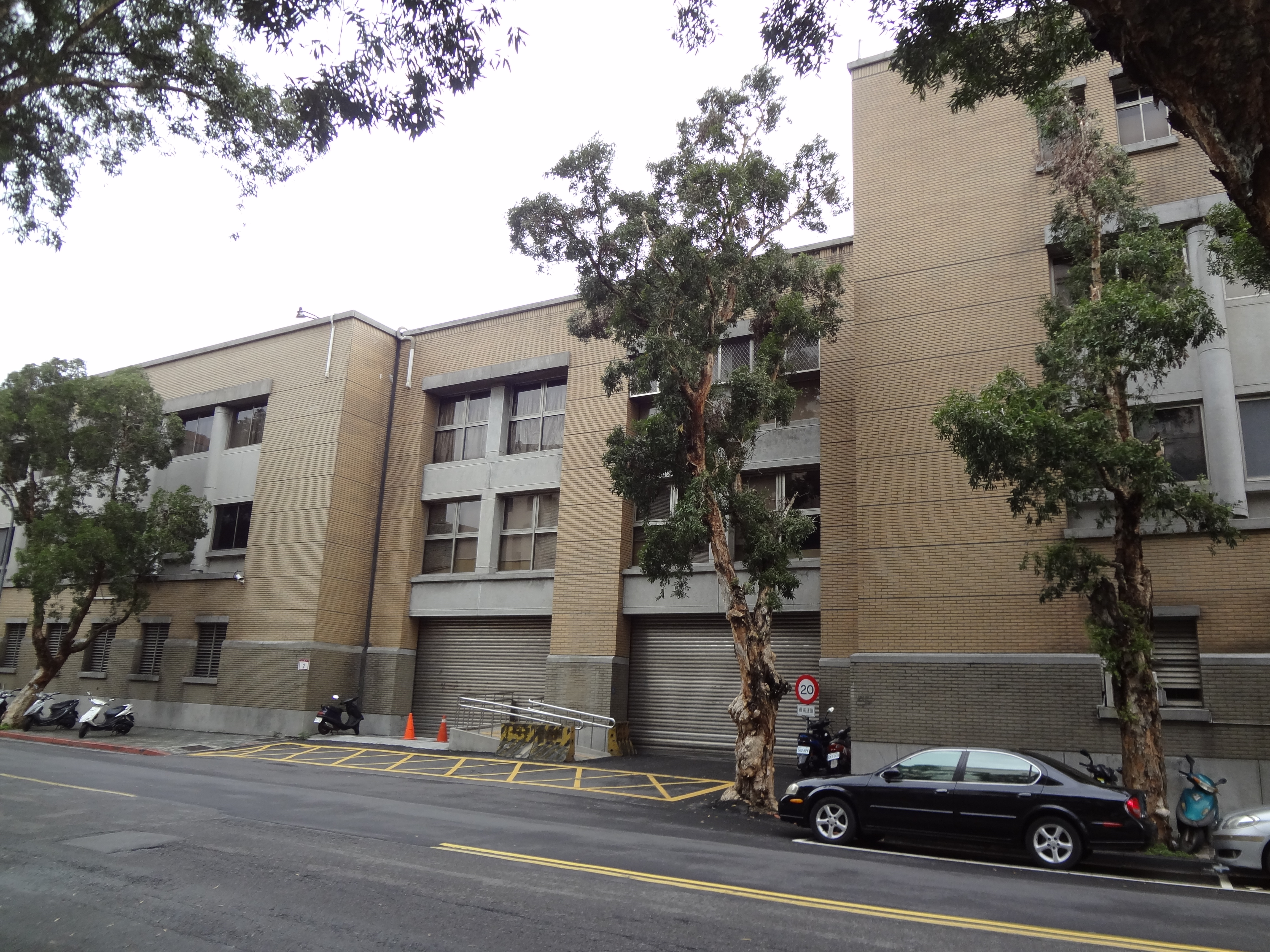 原行政院新聞局大樓，位於臺北市中正區天津街2號。